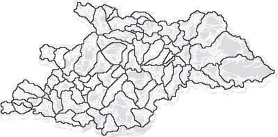 Categorie:Hărţi ale judeţului Maramureş